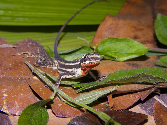 Norops vittigerus